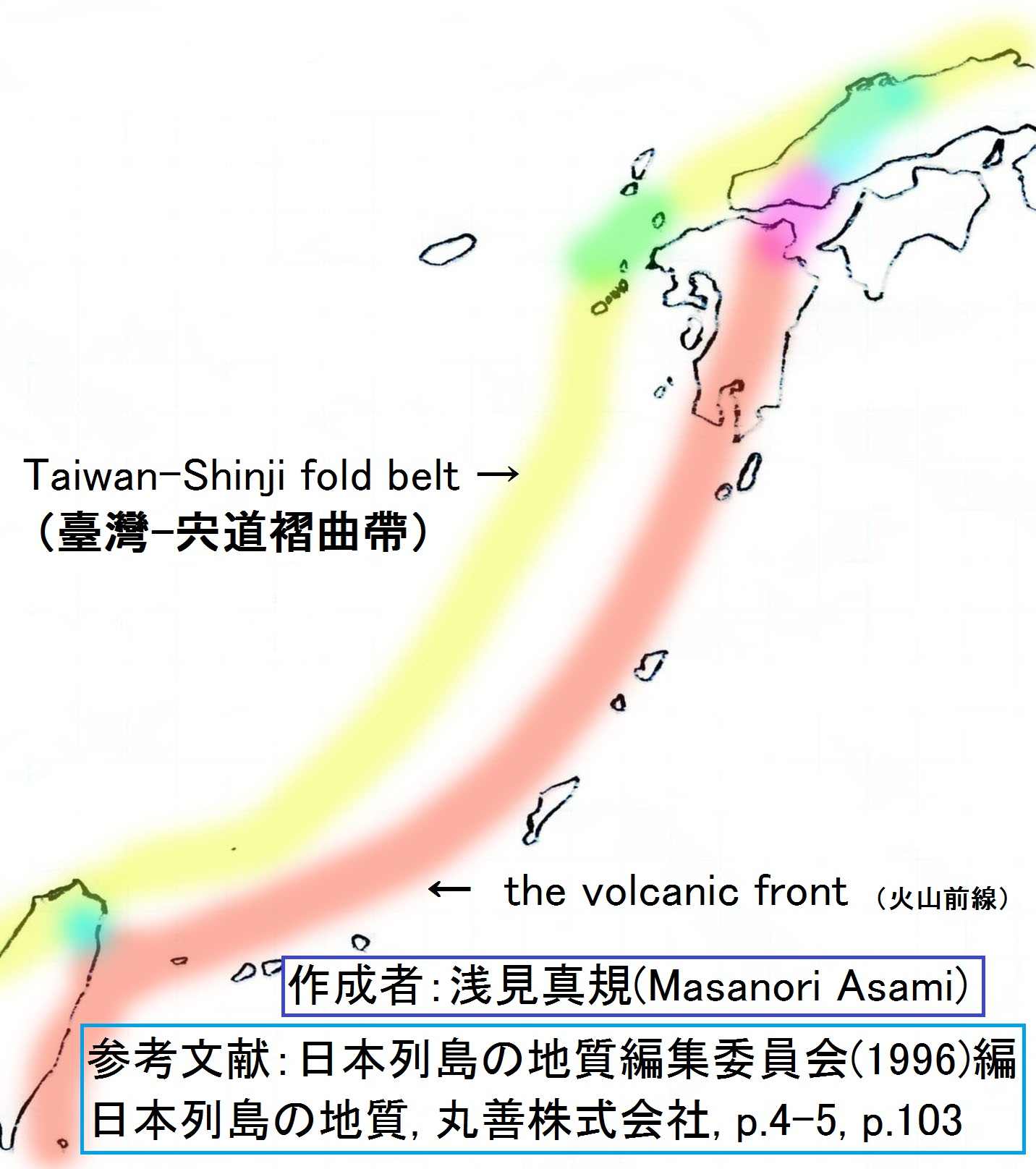 Japanese, English